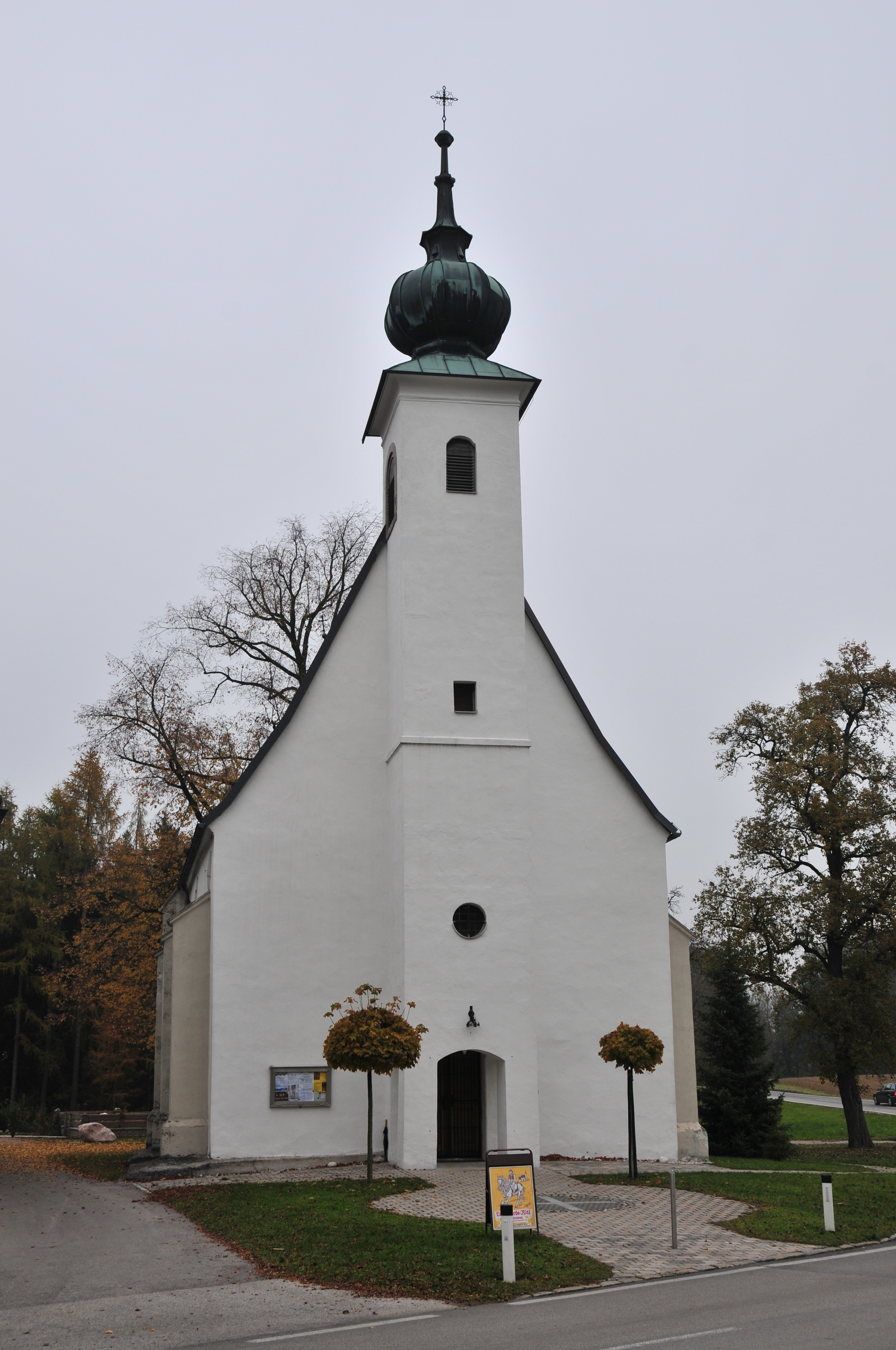 Kath. Filialkirche hl. Bartholomäus mit Friedhofsfläche